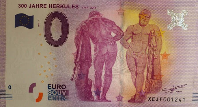 0-Euro-Schein Kassel, 300 Jahre Herkules